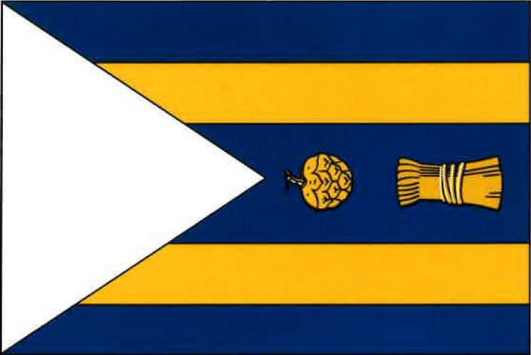 vlajka, Hořovičky, okres Rakovník